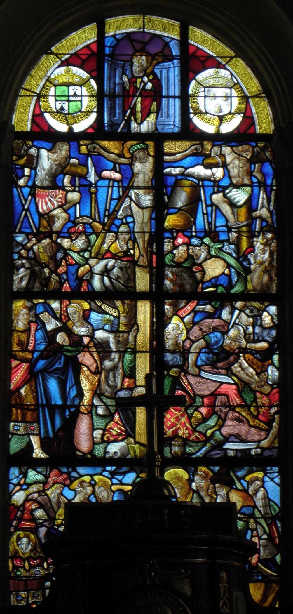 Baie 00 de l'église Notre-Dame et Saint-Bieuzy de Bieuzy (56).